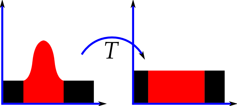 Schematische Darstellung einer Histogrammeinebnung schematical diagram of a histogram equalization